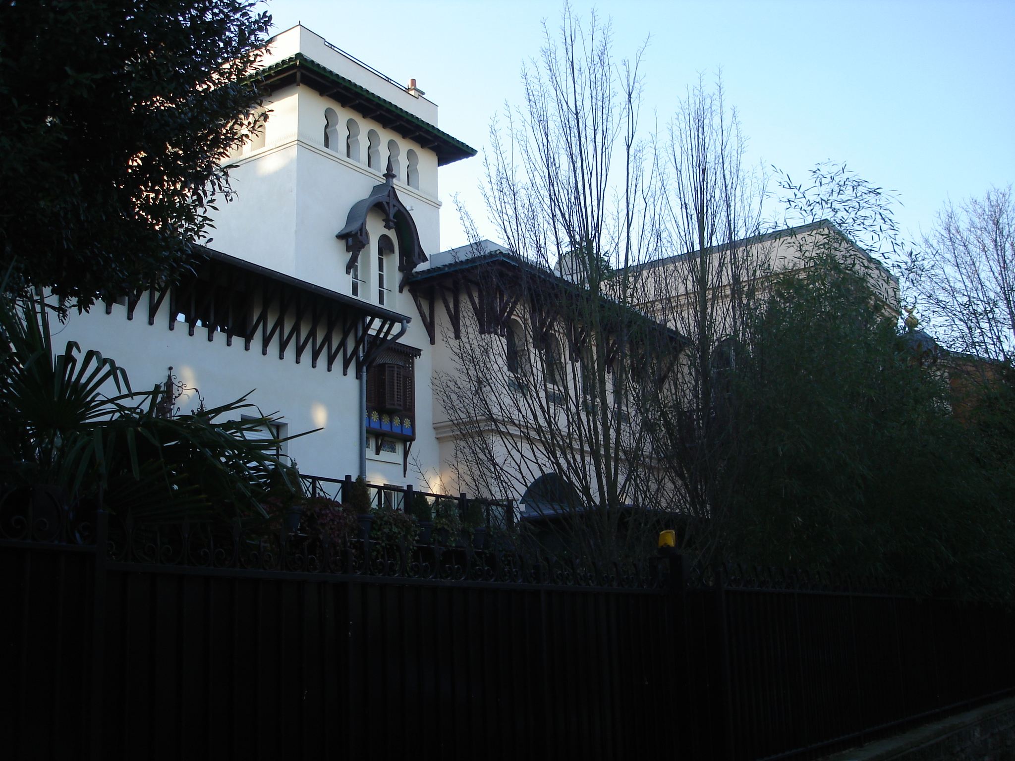 Villa mauresque: house built in 1892 in arabic style. Location: Villa Chaptal in Levallois-Perret